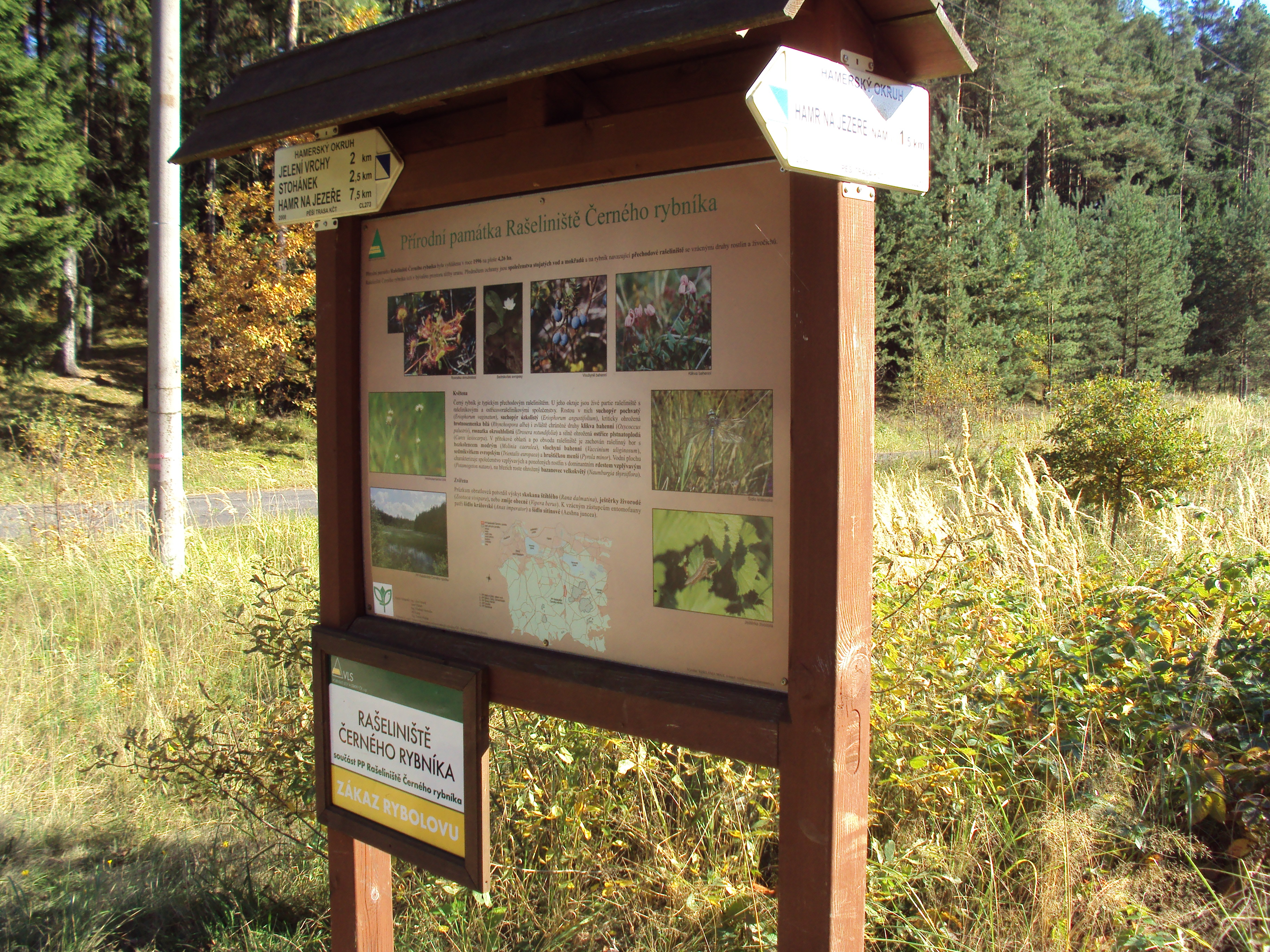 PP Rašeliniště Černého rybníka, infocedule, jižně 1,5 km od Hamr na Jezeře